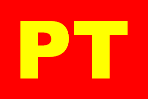 Bandera del Partido de los Trabajadores PT flag, Uruguay